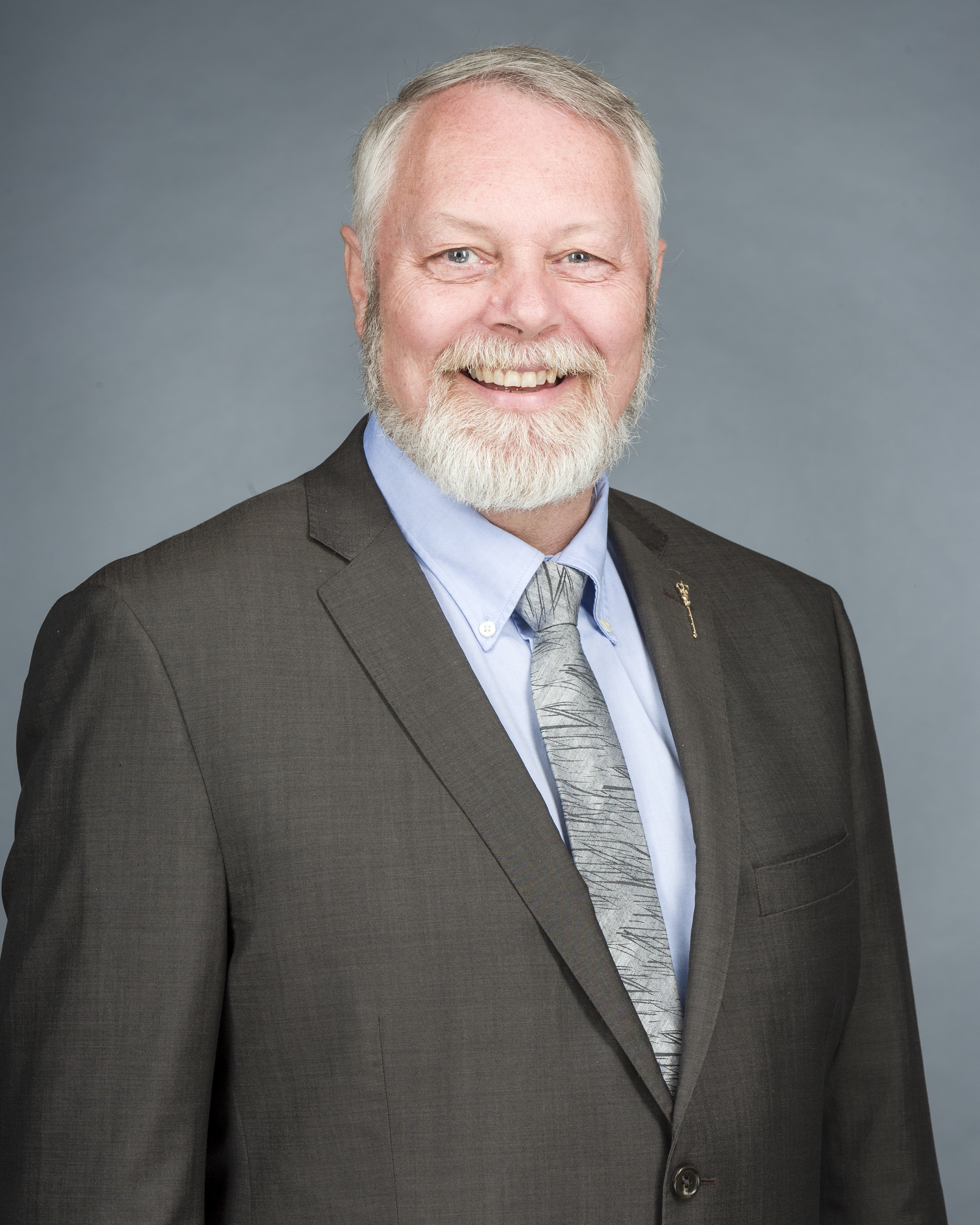 Alberta MLA Don MacIntyre